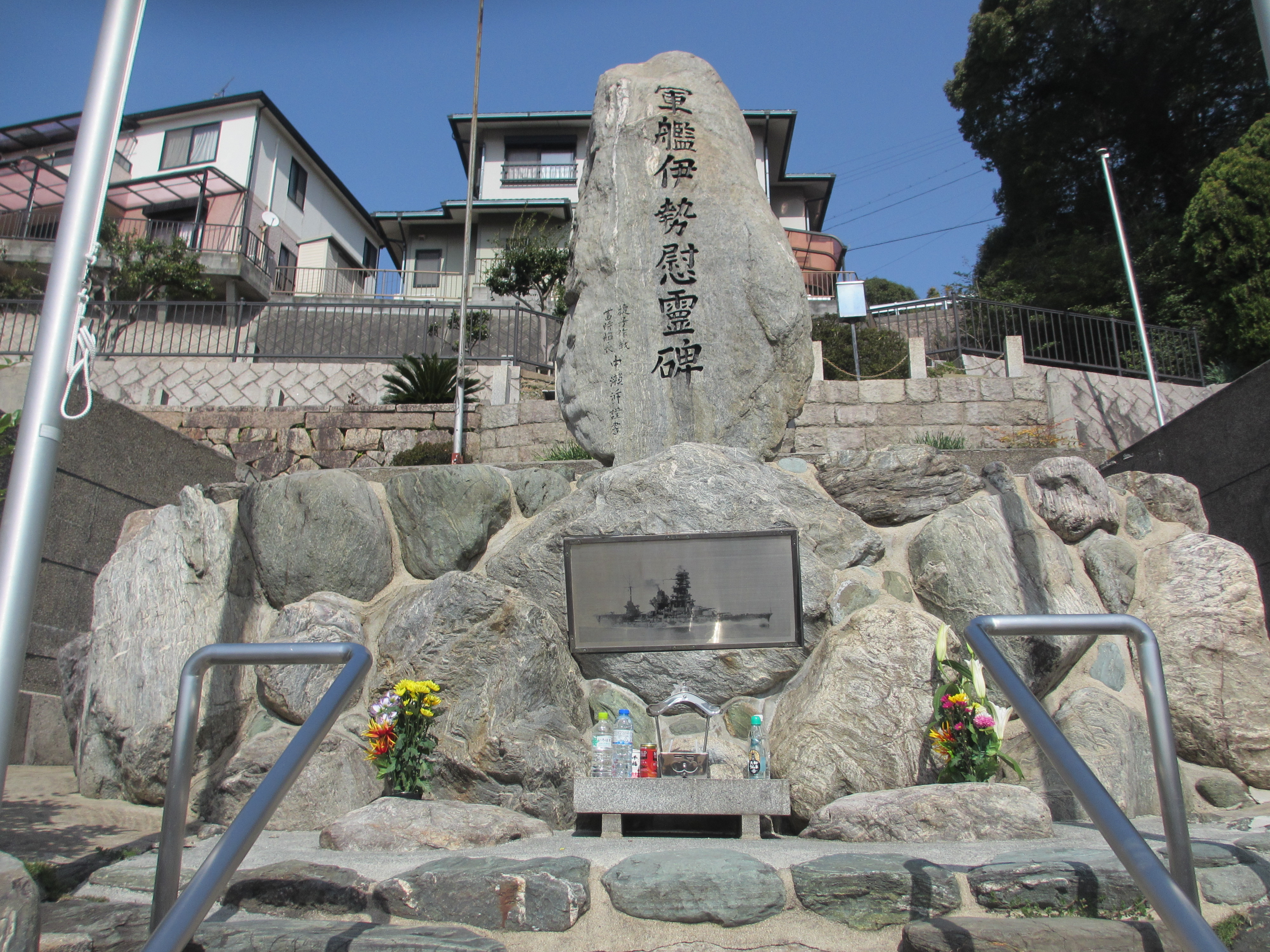 呉市上長迫町旧海軍墓地、隣鈴谷慰霊碑